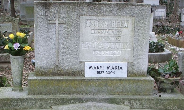 Csóka Béla (Budapest, 1898. július 4. – Budapest, 1972. július 2.) operaénekes (bariton), énektanár sírja Budapesten. Új köztemető: 156-1-146/147.